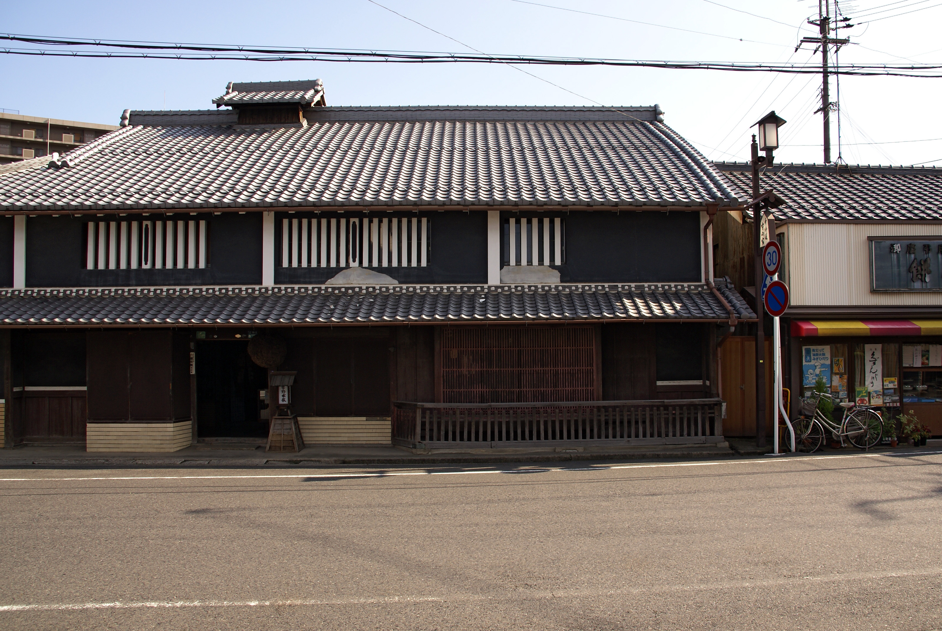 Moriyama-juku in Moriyama, Shiga prefecture, Japan